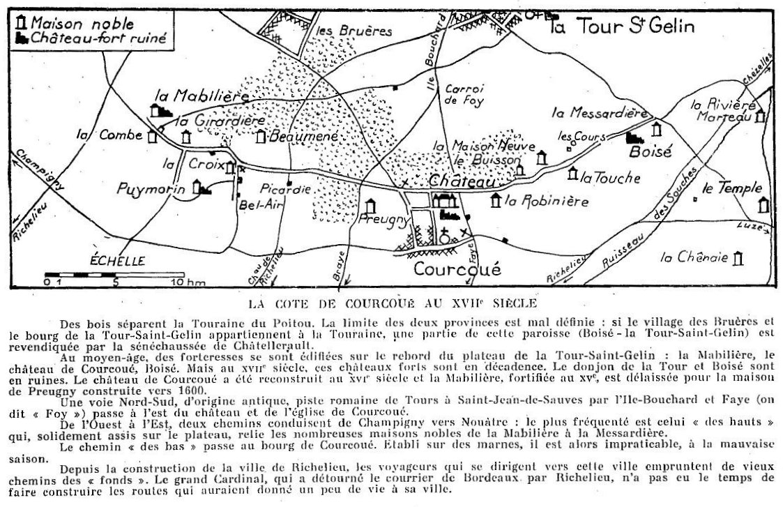 Carte de Courcoué au XVII° siècle.